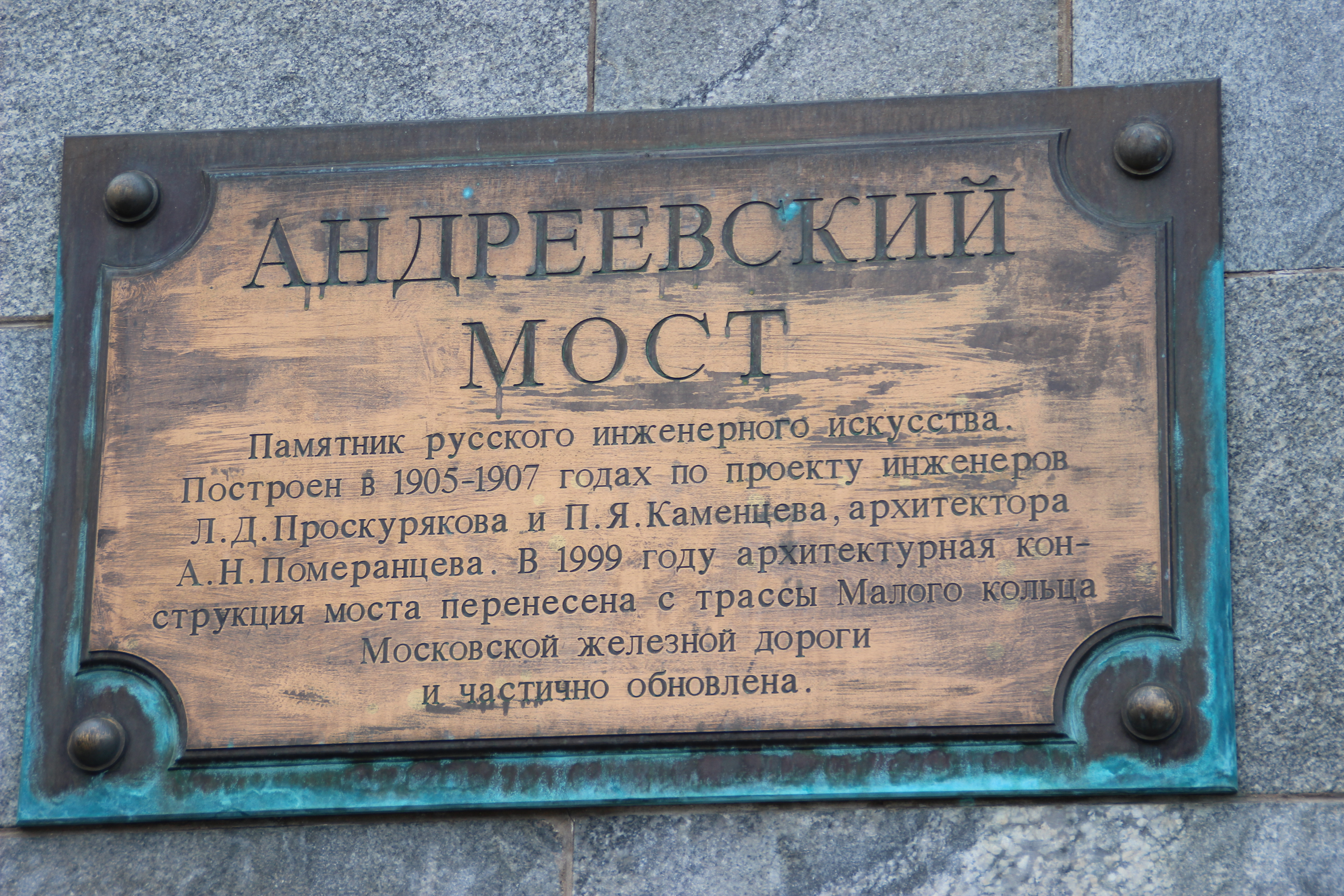 Памятная табличка на Андреевском мосту